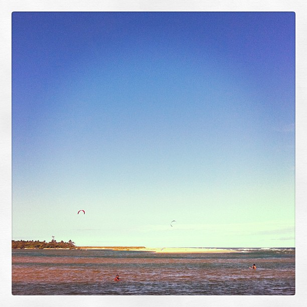 Praia de Buraquinho